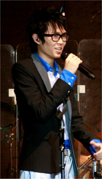 Khalil Fong 2008